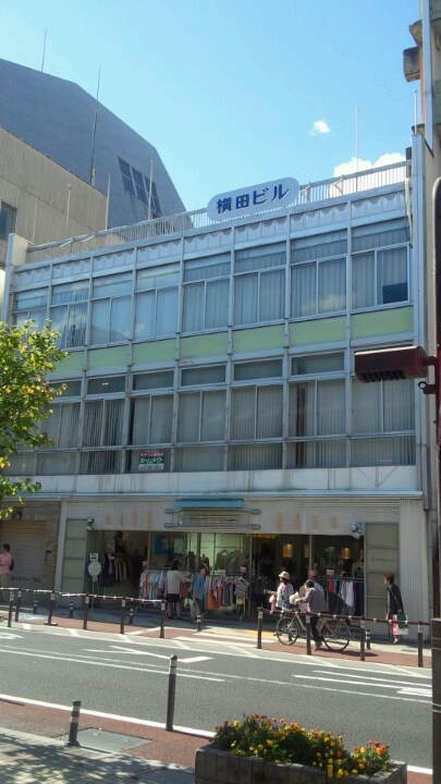 かつて長崎屋山形中央店が入居していた「横田ビル」。現在は「SUZUTAN山形店」が入居している。